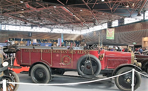 Car Berliet.